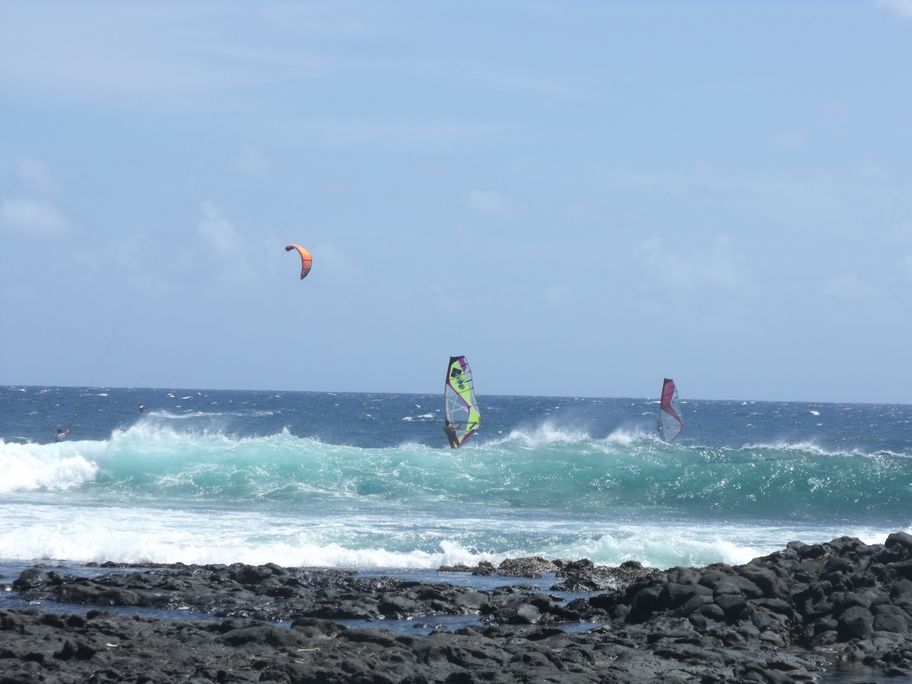 Flysurfer et veliplanchiste s'entraînant sur le spot du lieu dit Ravine Blache à Saint Pierre Réunion.